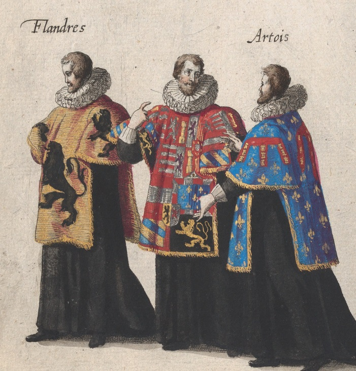 Pompes funèbres de l'archiduc Albert d'Autriche à Bruxelles / Série de 65 gravures d'un recueil relatant les funérailles d'Albert d'Autriche à Bruxelles le 11 mars 1622.